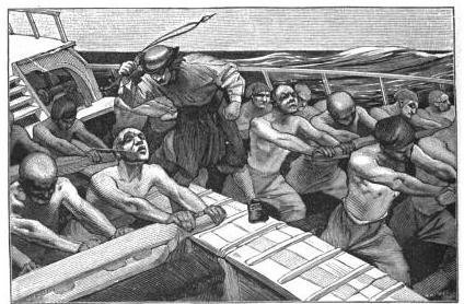 Illustration tirée de Histoire de France, cours élémentaire, Ernest Lavisse, Armand Colin, 1913, page 128 de l'édition Heath de 1919.